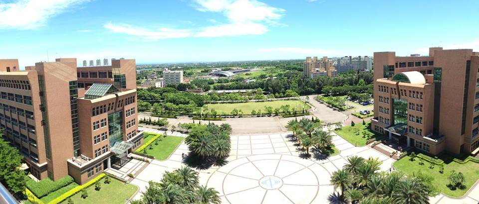 中國科技大學新竹校區校園，照片內建物從左至右依序為日新樓、北湖站、涵德樓。